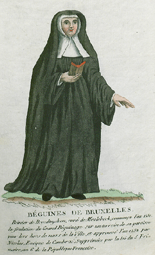 Collection de costumes de tous les ordres monastiques, supprimés à differentes époques, dans la ci-devant Belgique, Bruxelles, Philippe Joseph Maillart et sœur, 1811